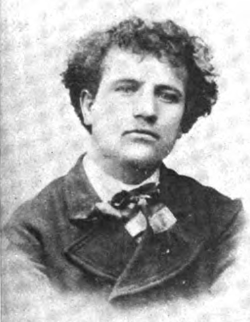 Giuseppe Grandi a 25 anni